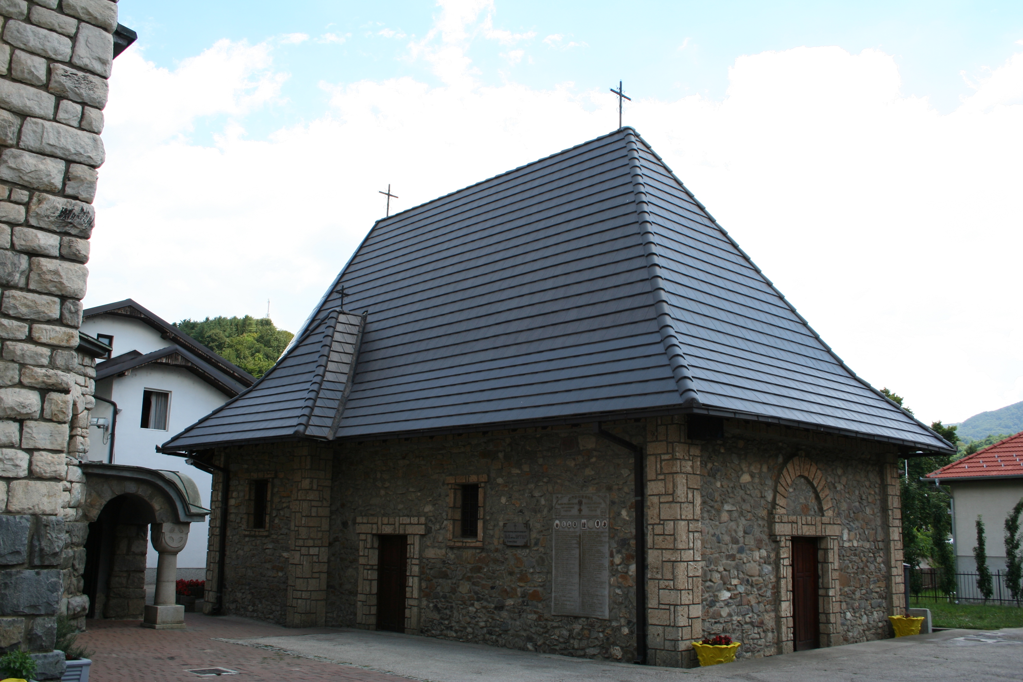 Crkva Vaznesenja gospodnjeg (stara), Krupanj